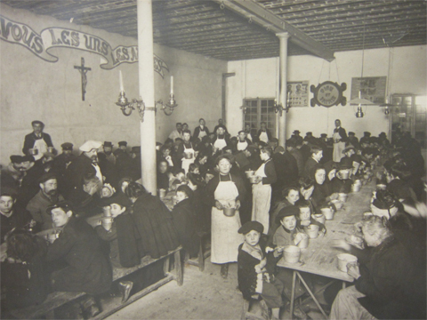 La Mie De Pai Le Refectoire